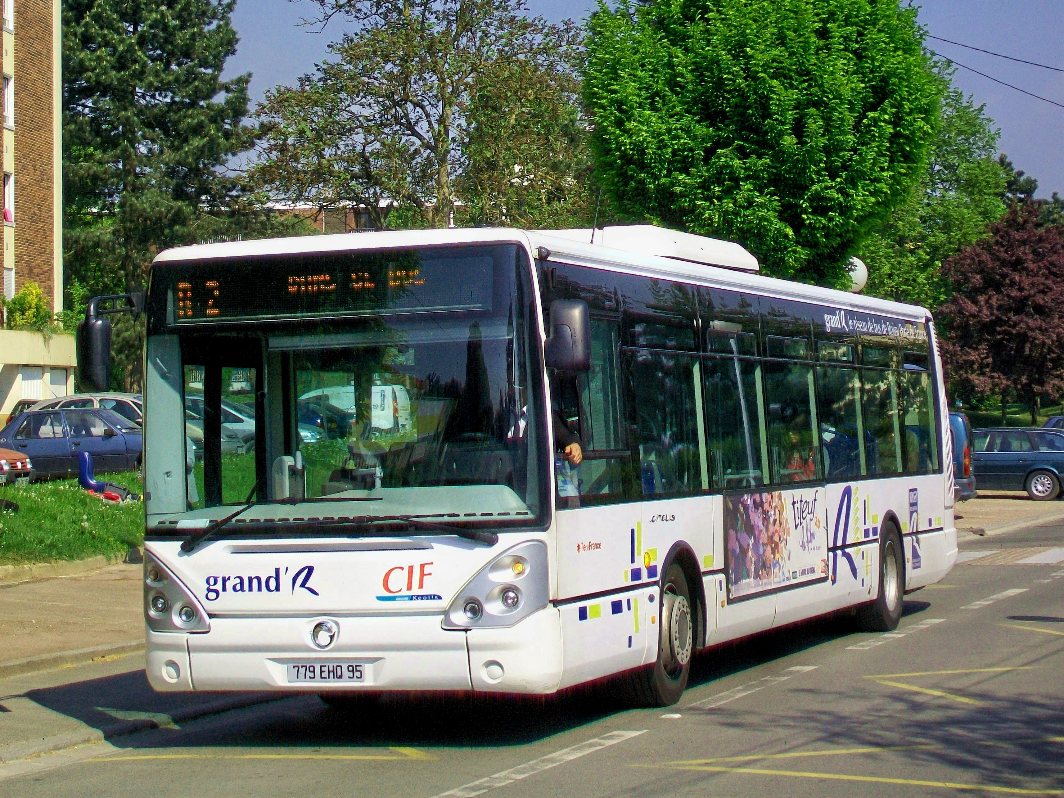 Bus de la ligne R2, du réseau « Grand R » de la Communauté de communes Roissy-Porte de France, exploité par les CIF.